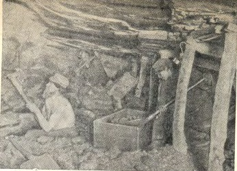 Добичь вугілля на Бресто огодухівському руднику 1900 рік.